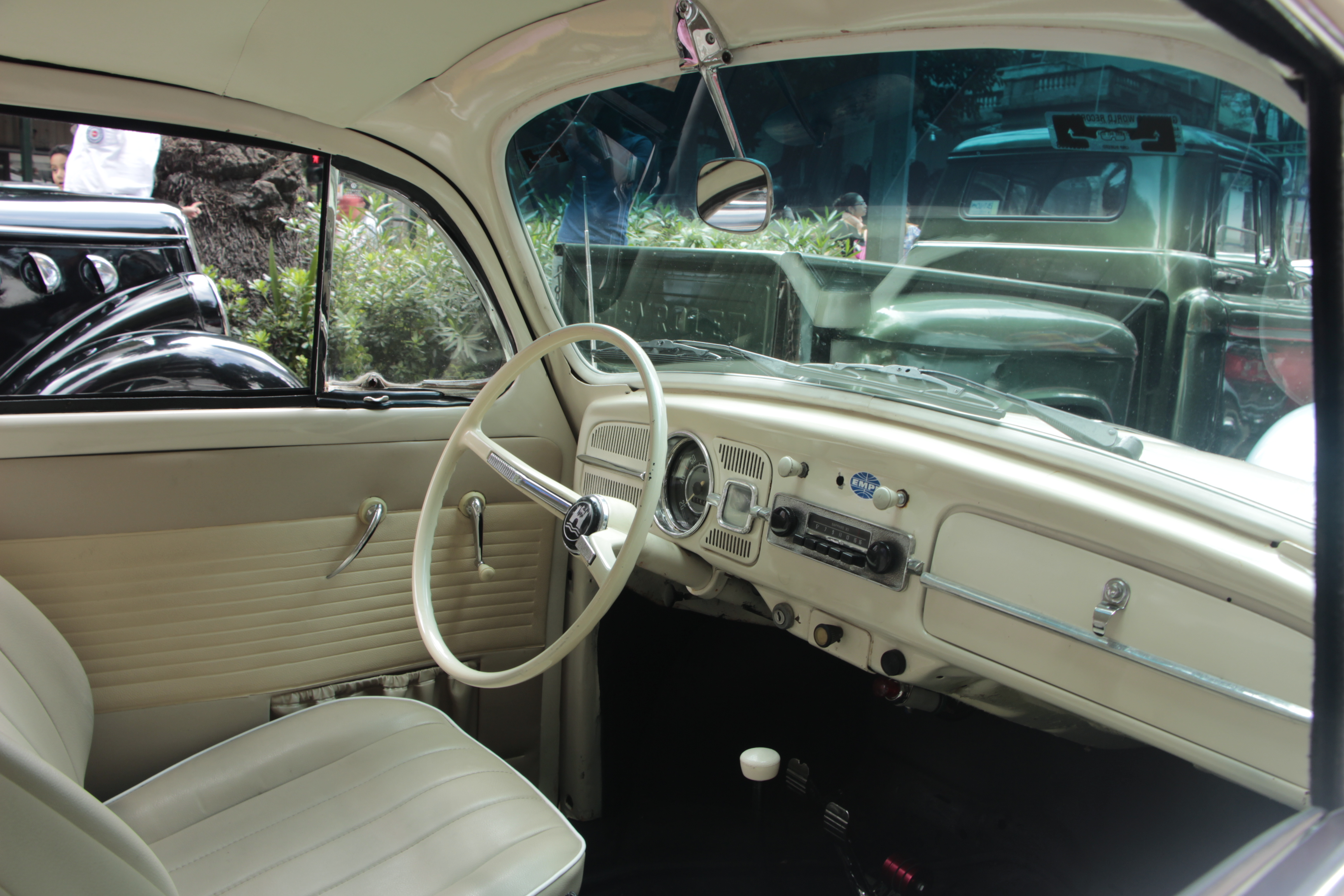 Desfile de autos clásicos que se llevo a cabo en la Ciudad de México, el 5 de octubre en Reforma y que rompió el Record Guinness.